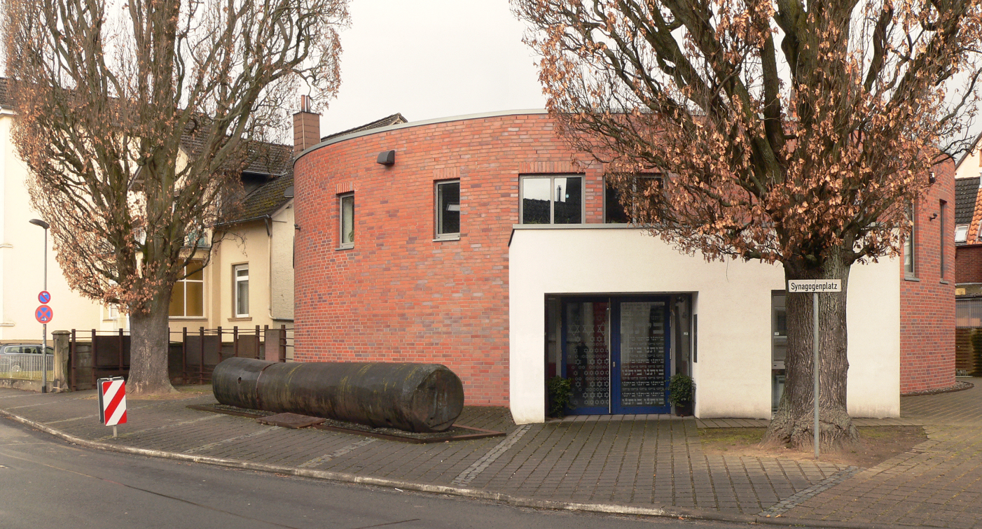 Jüdische Synagoge Hameln am Synagogenplatz laut Schild